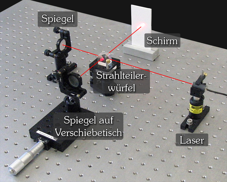 Aufbau eines Michelson-Interferometers mit Diodenlaser, Strahlteilerwürfel, einem fest stehenden und einem verschiebbaren Spiegel, mit Beschriftung und Strahlengang.